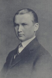 Zdeněk Lhota